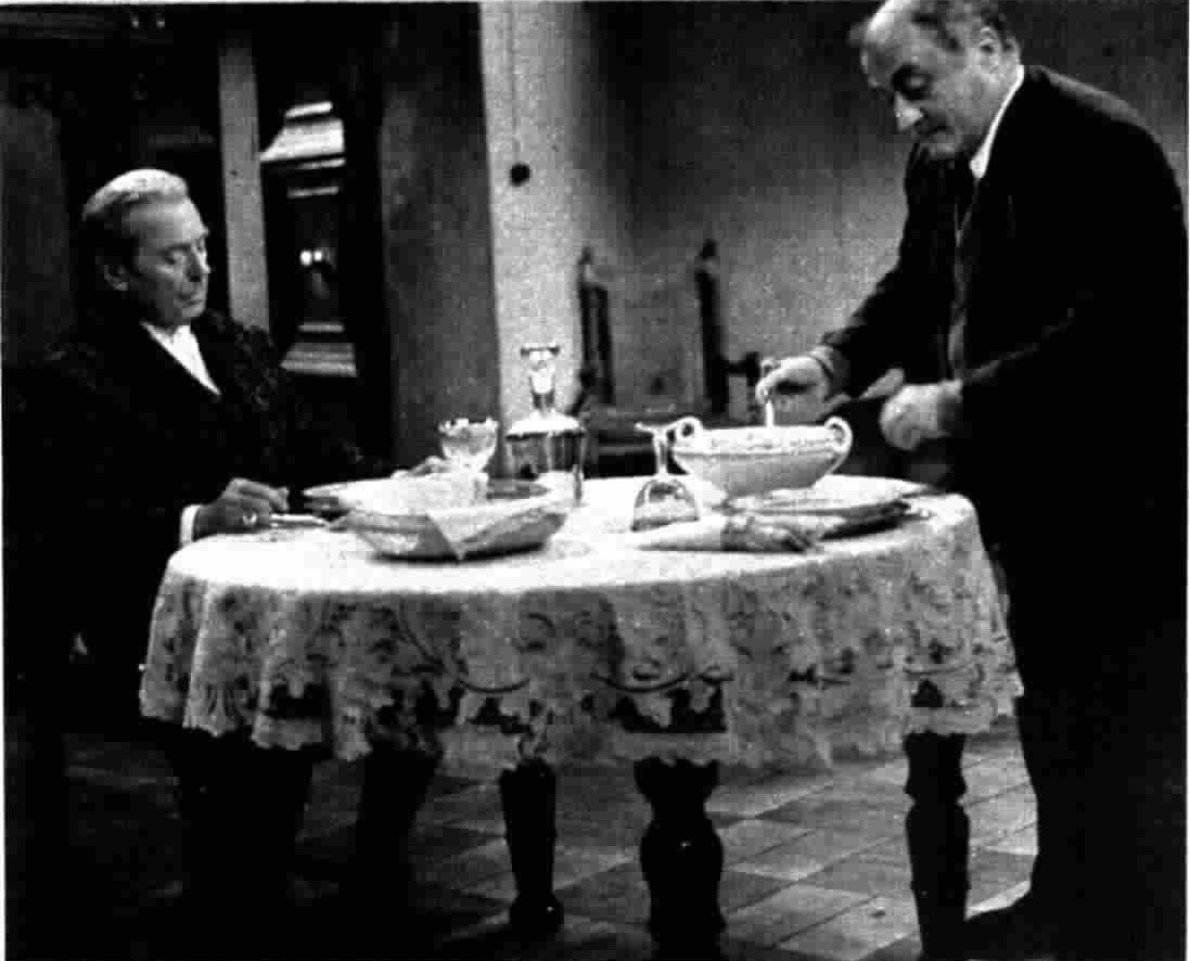 Foto di scena della riduzione televisiva (1974), per la regia di Enrico Colosimo , del romanzo Roma di Aldo Palazzeschi. In foto: Antonio Battistella e Dino Curcio.